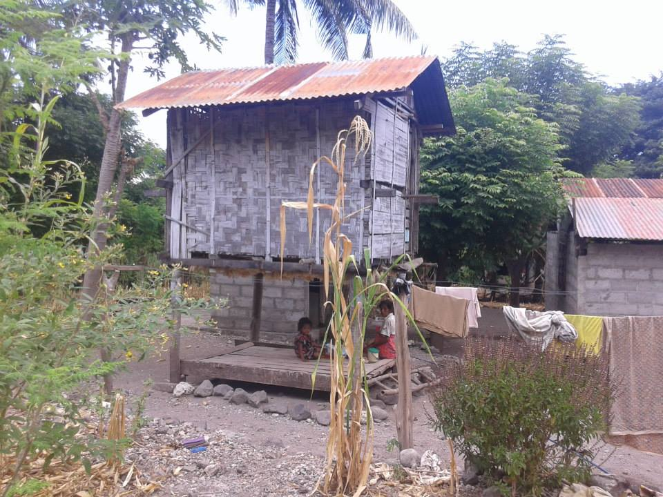 Atauro